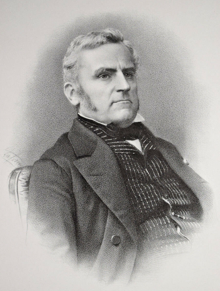 Marie-Louis-Pierre-Félix Esquirou de Parieu